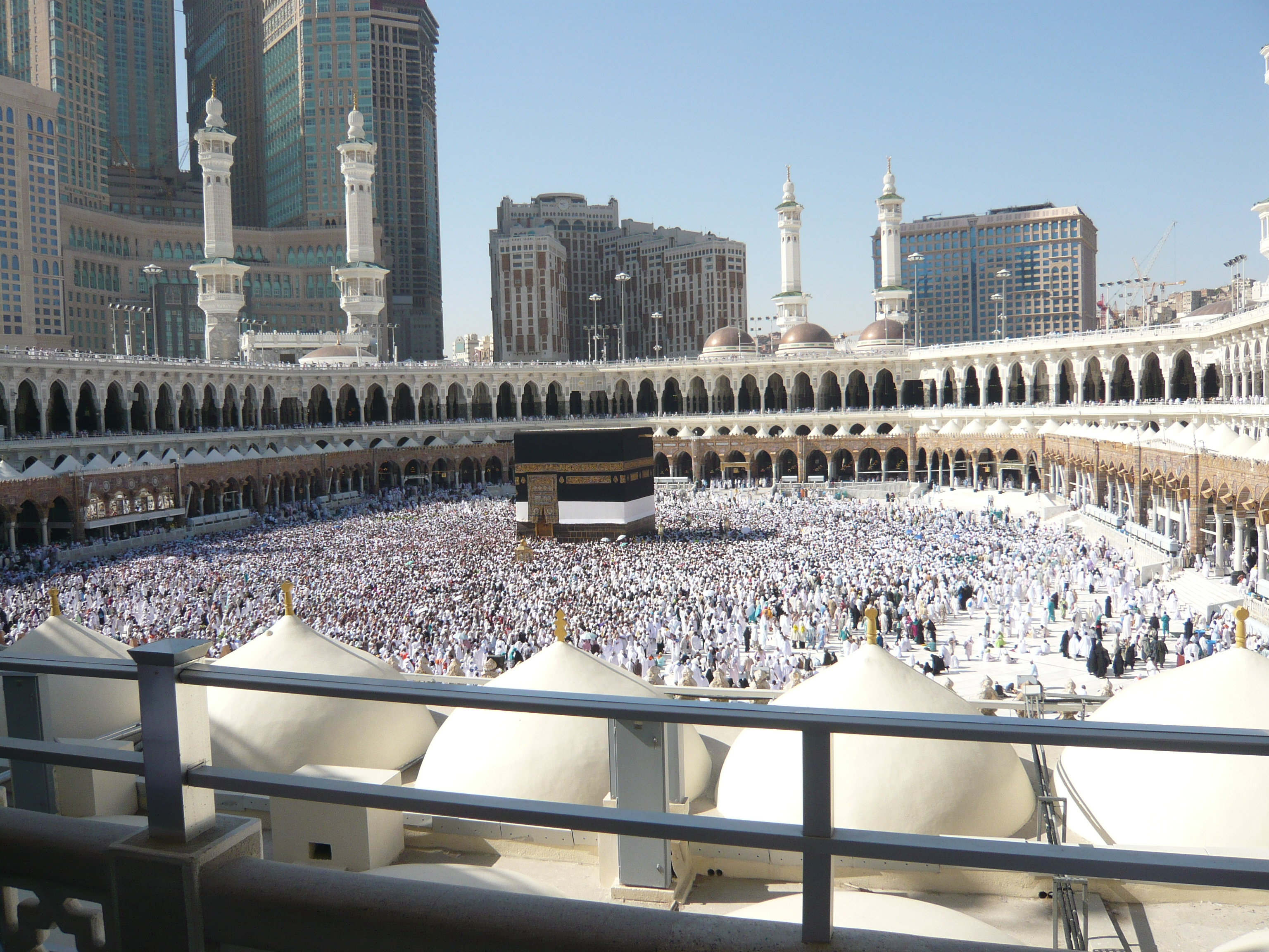 HAC 2010 KABE VE GÖKDELEN